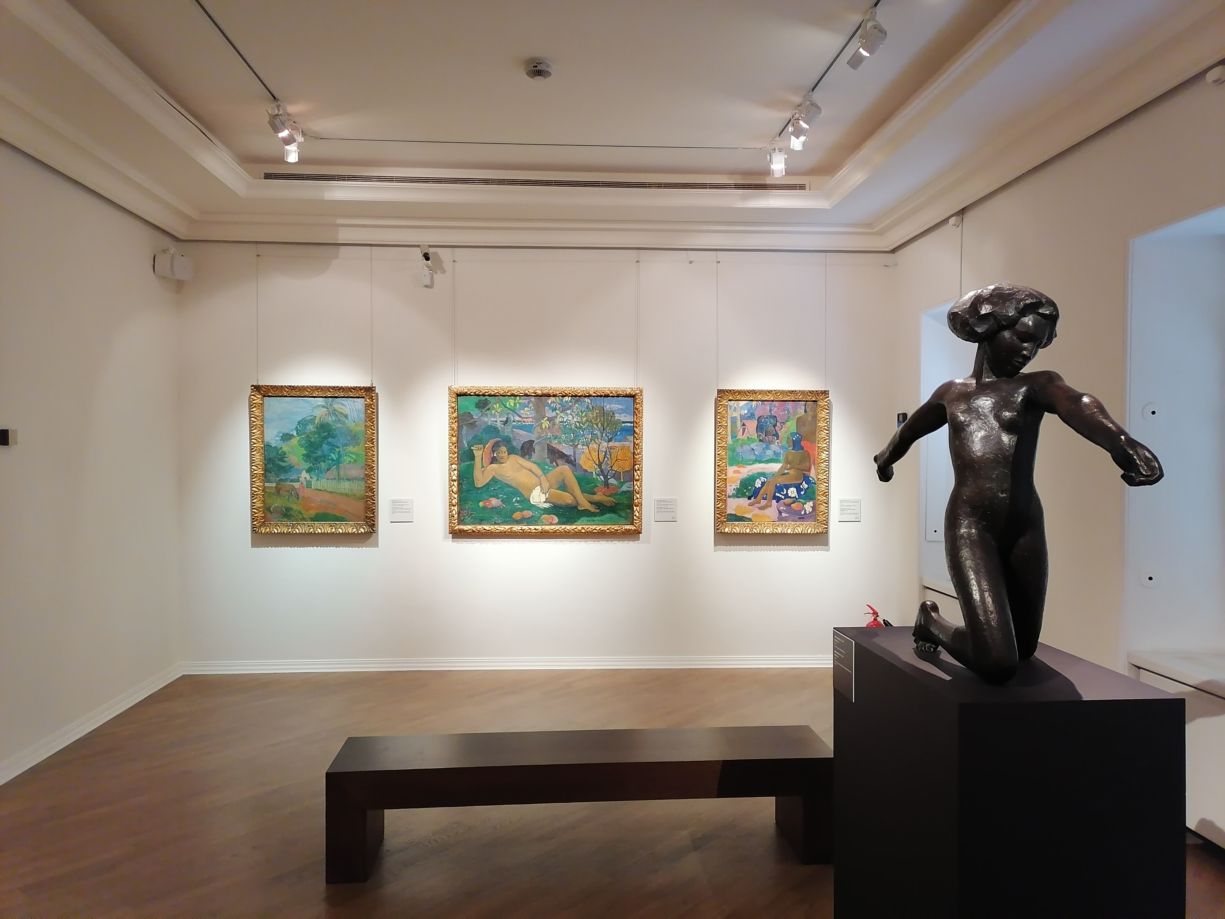 Пушкинский музей, галерея искусства 19-20 веков. Поль Гоген (слева направо): «Пейзаж (Лошадь на дороге»), «Королева (Жена короля)», «Её звали Вайраумати»